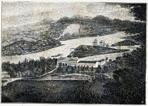 «Vekkerø. (Efter et ældre Væggemaleri paa Bogstad).»